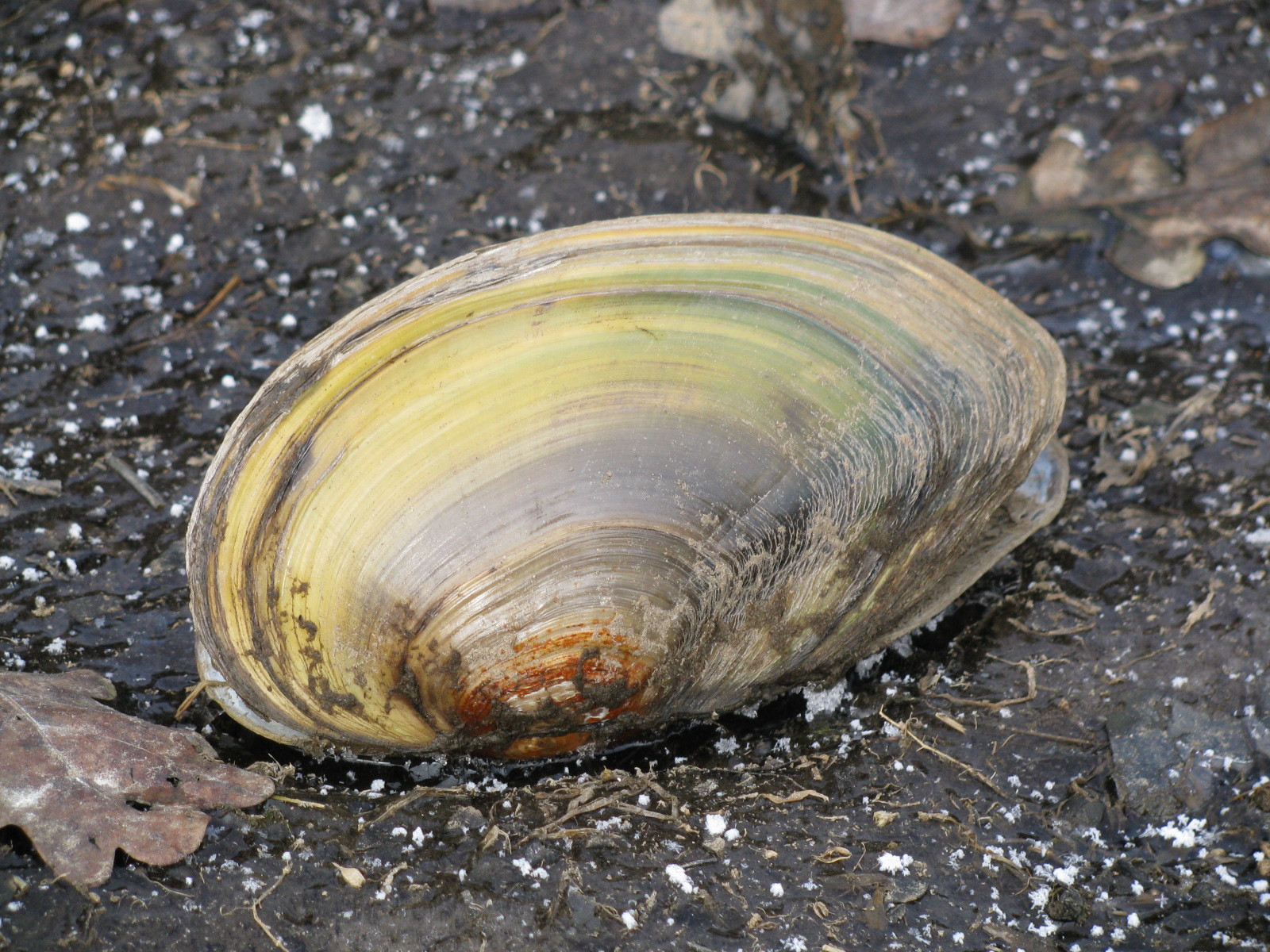 Teichmuscheln im Popeldammteich der Schwarzen Röder am Rande der Massenei im gleichnamigen Landschaftsschutzgebiet.